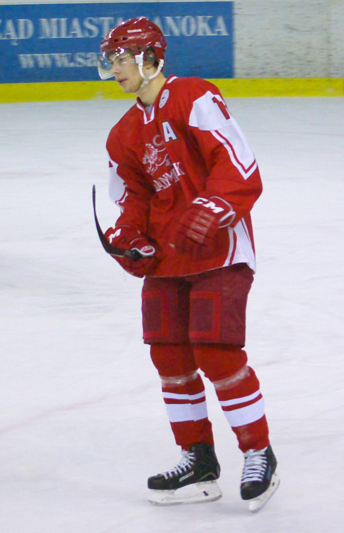 Oliver Bjorkstrand podczas Mistrzostw Świata Juniorów w Hokeju na Lodzie 2014 I Dywizji w Sanoku, Dania - Łotwa 4:1, Arena Sanok 19 grudnia 201